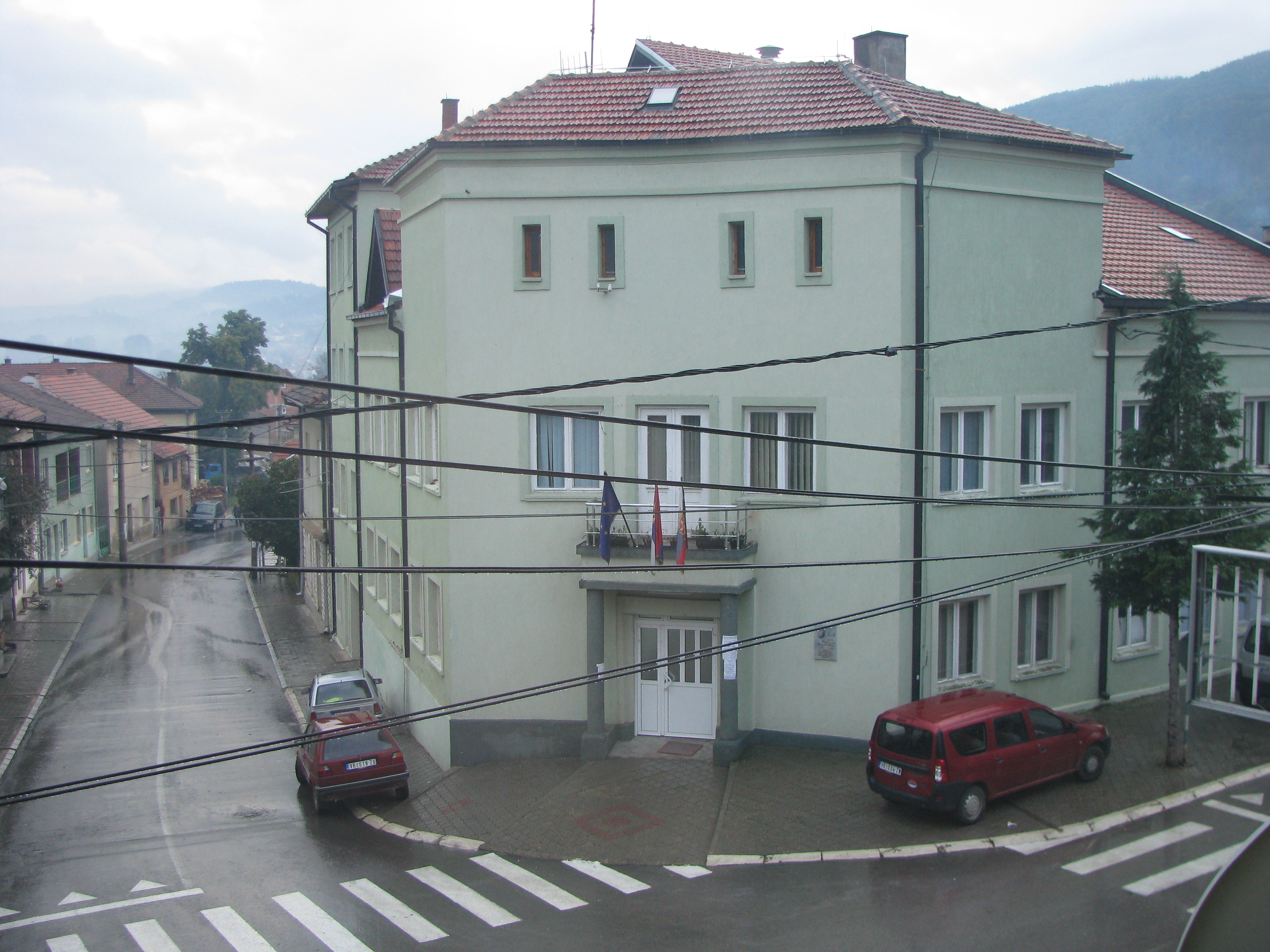 Улице Босилеграда.